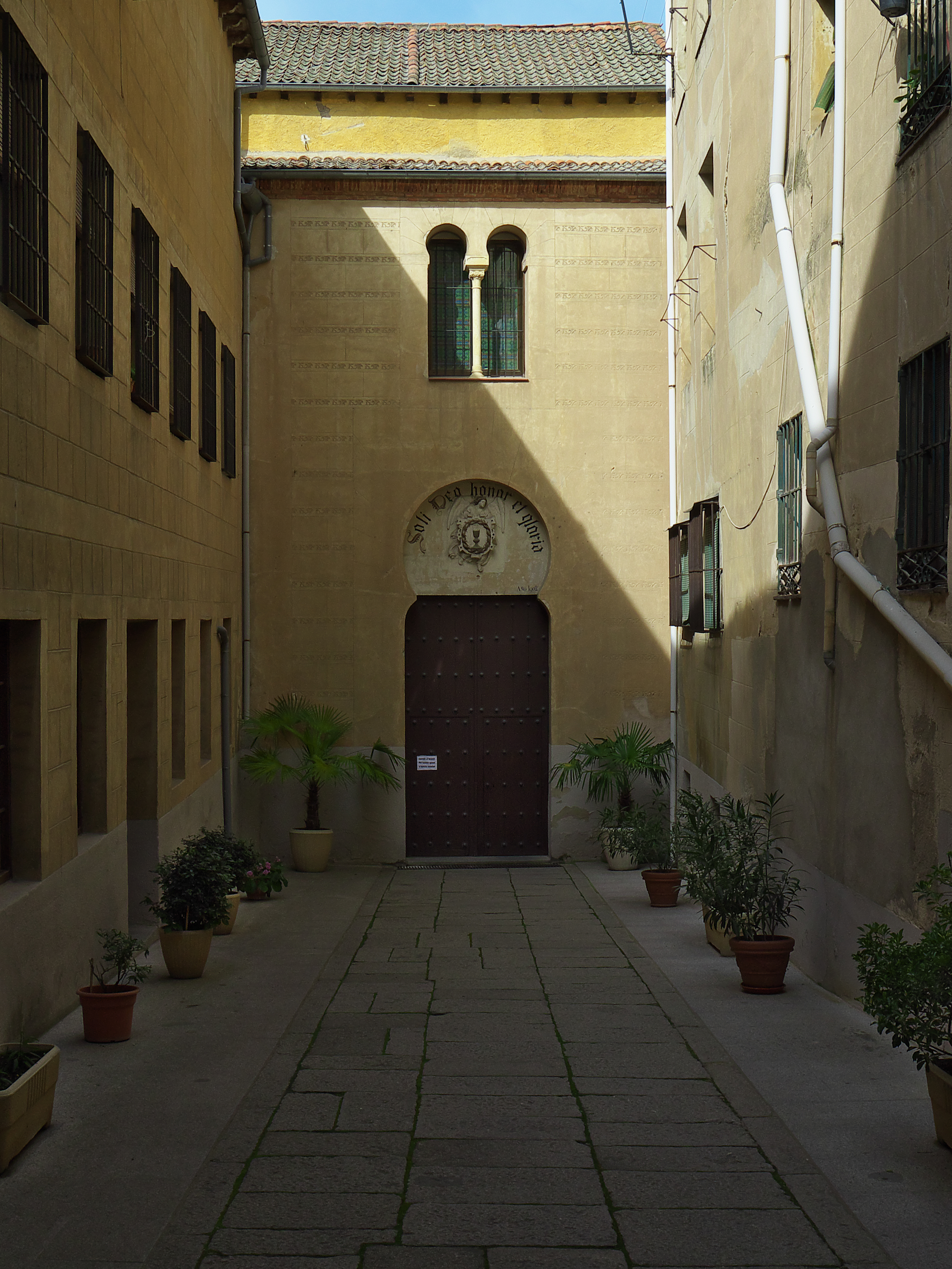 Convento de las hermanas clarisas con origen sefardita